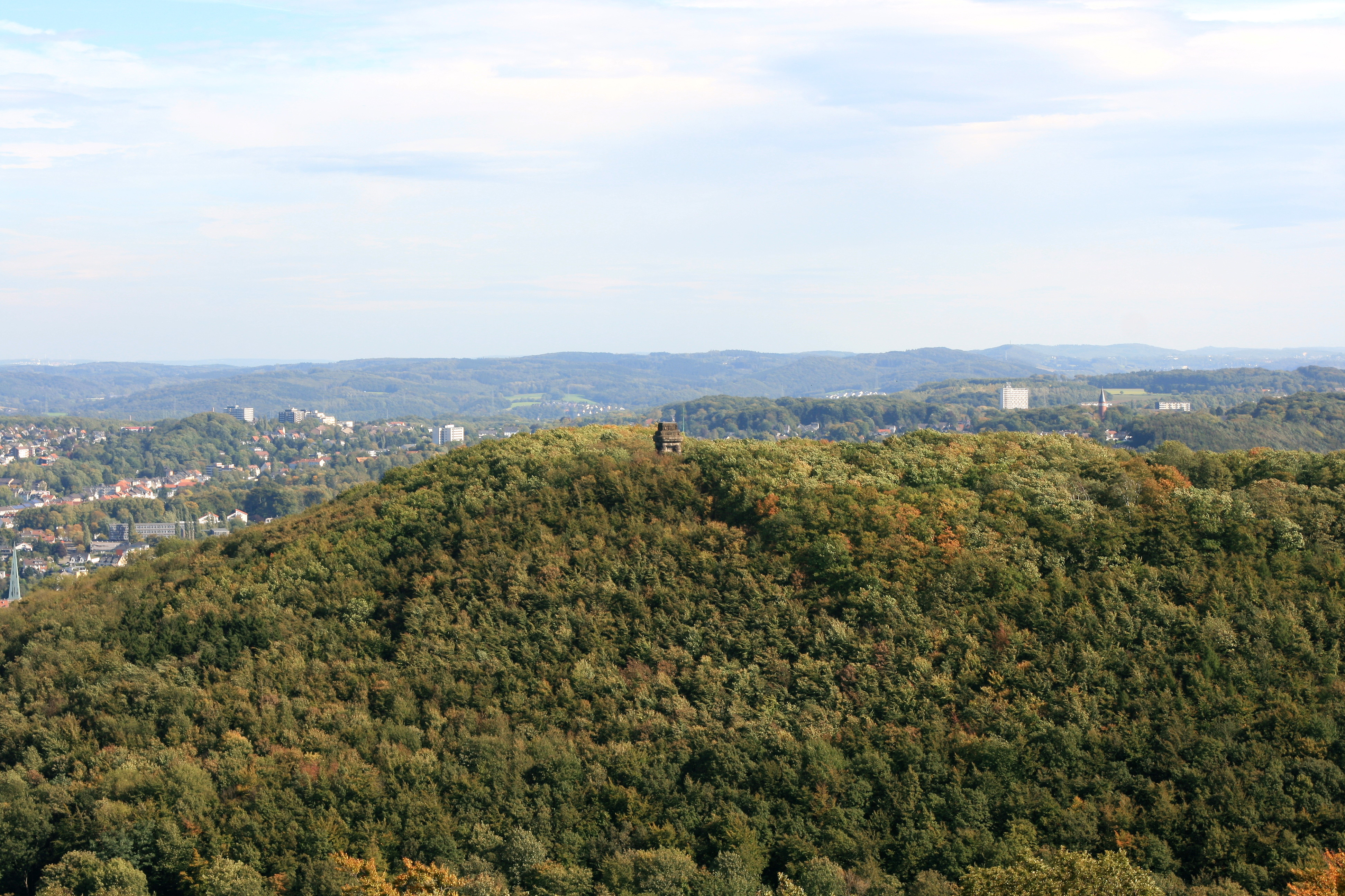 Goldberg, Blick vom Eugen-Richter-Turm in Hagen